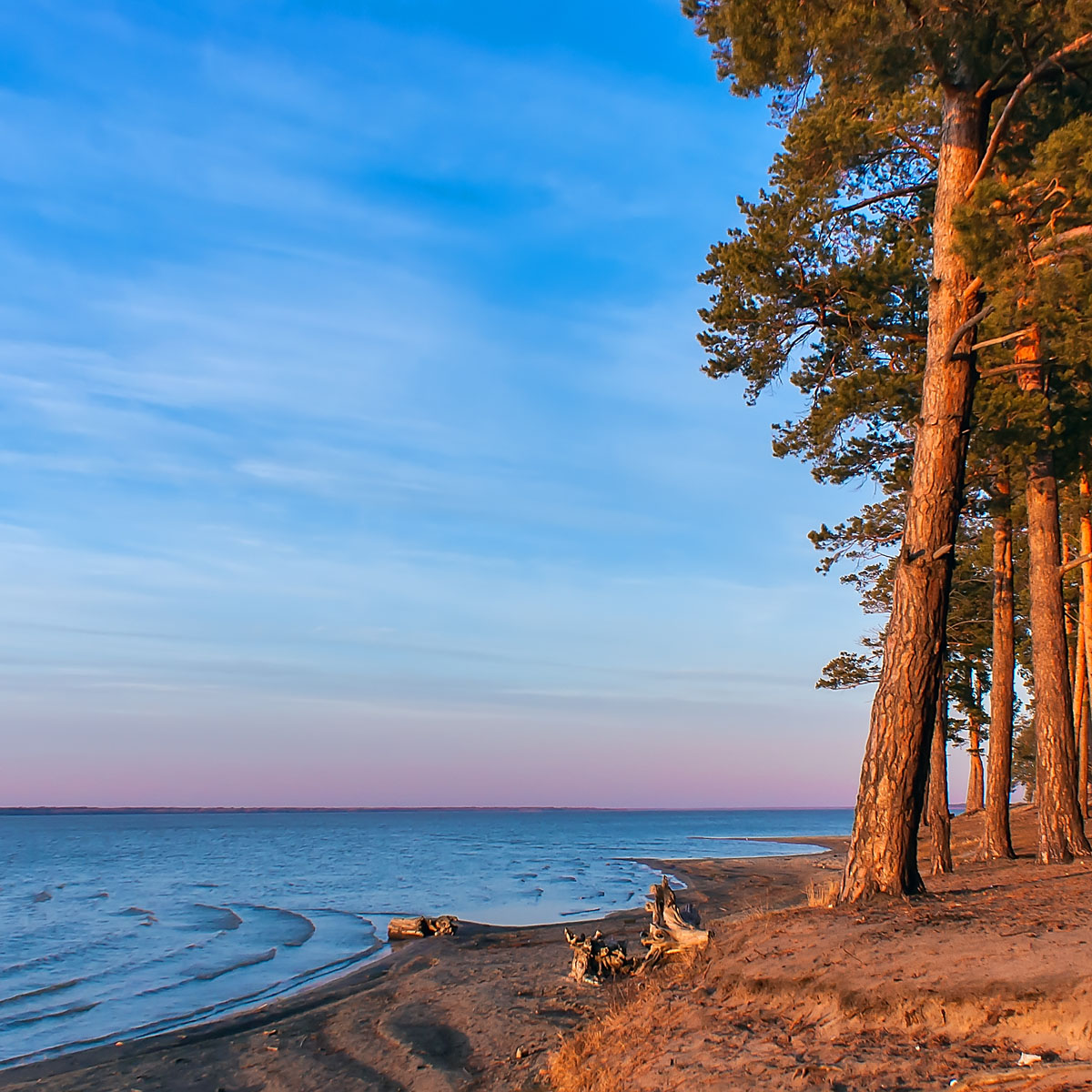 Лебяжье, Егорьевский район This image is related to the protected area of Russia number 2210034